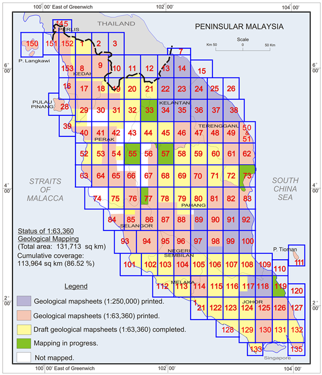 Status pemetaan geologi semenanjung 2013